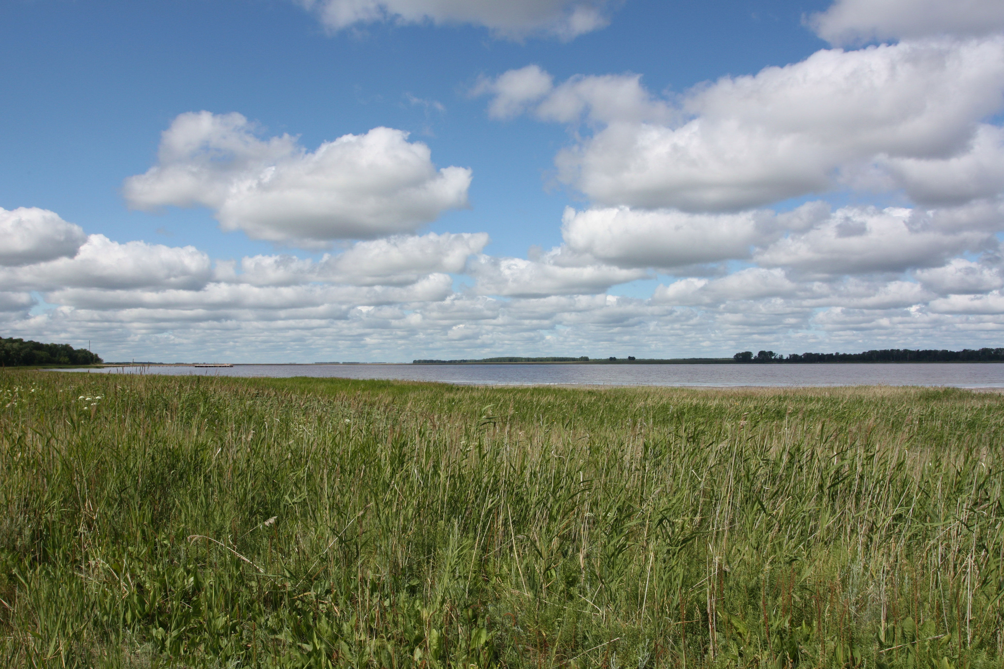 Озеро Карачи: Чановский район, Новосибирская область This image is related to the protected area of Russia number 5400131